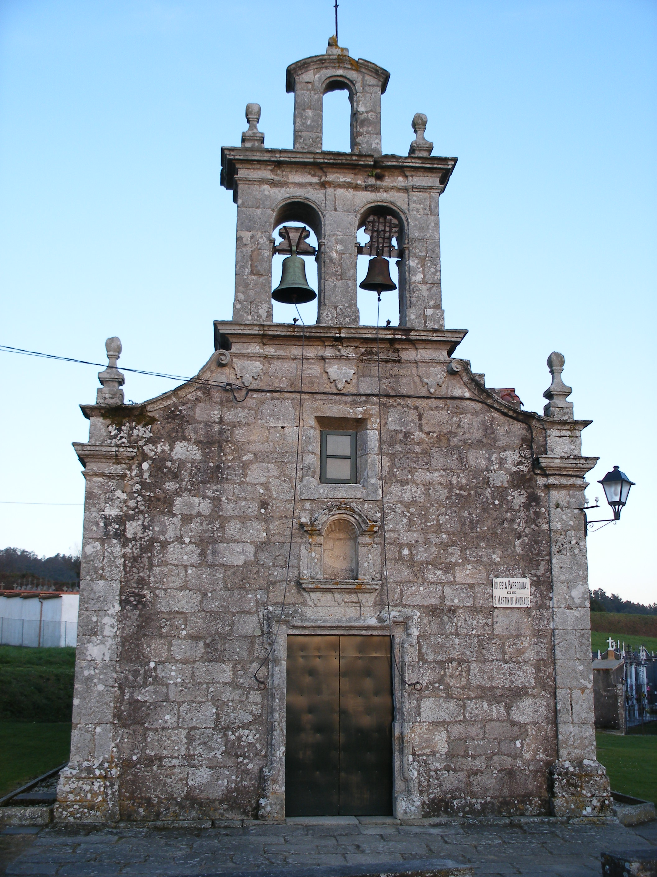 Igrexa parroquial de San Martiño de Andrade Categoría:Imaxes de Andrade Categoría:Imaxes de igrexas de Pontedeume